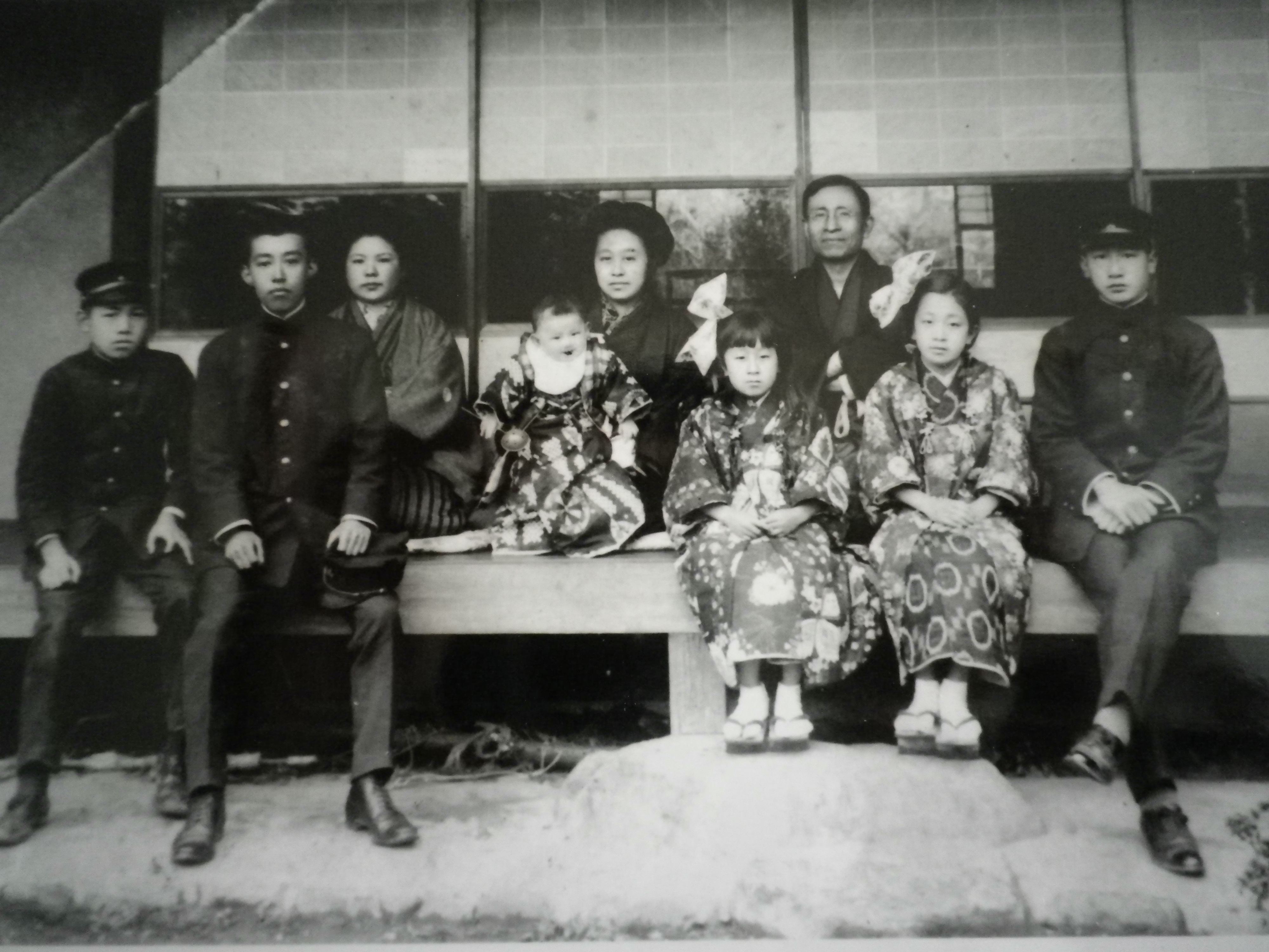 1918年（大正７年）に京都下鴨で撮影された水崎基一一家、撮影者不明